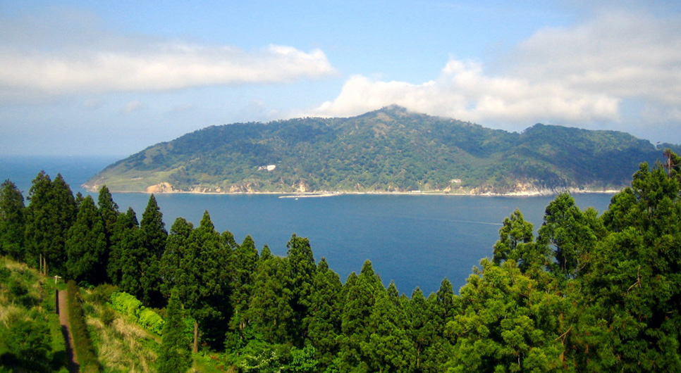 Kinkazan (Miyagi) from Oshika peninsula.